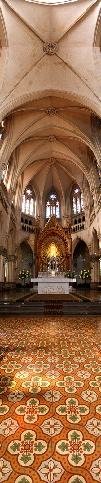 Interior de la Basílica de Nuestra Señora del Perpetuo Socorro, ubicada en la avenida Almirante Blanco Encalada 2950, Santiago de Chile.